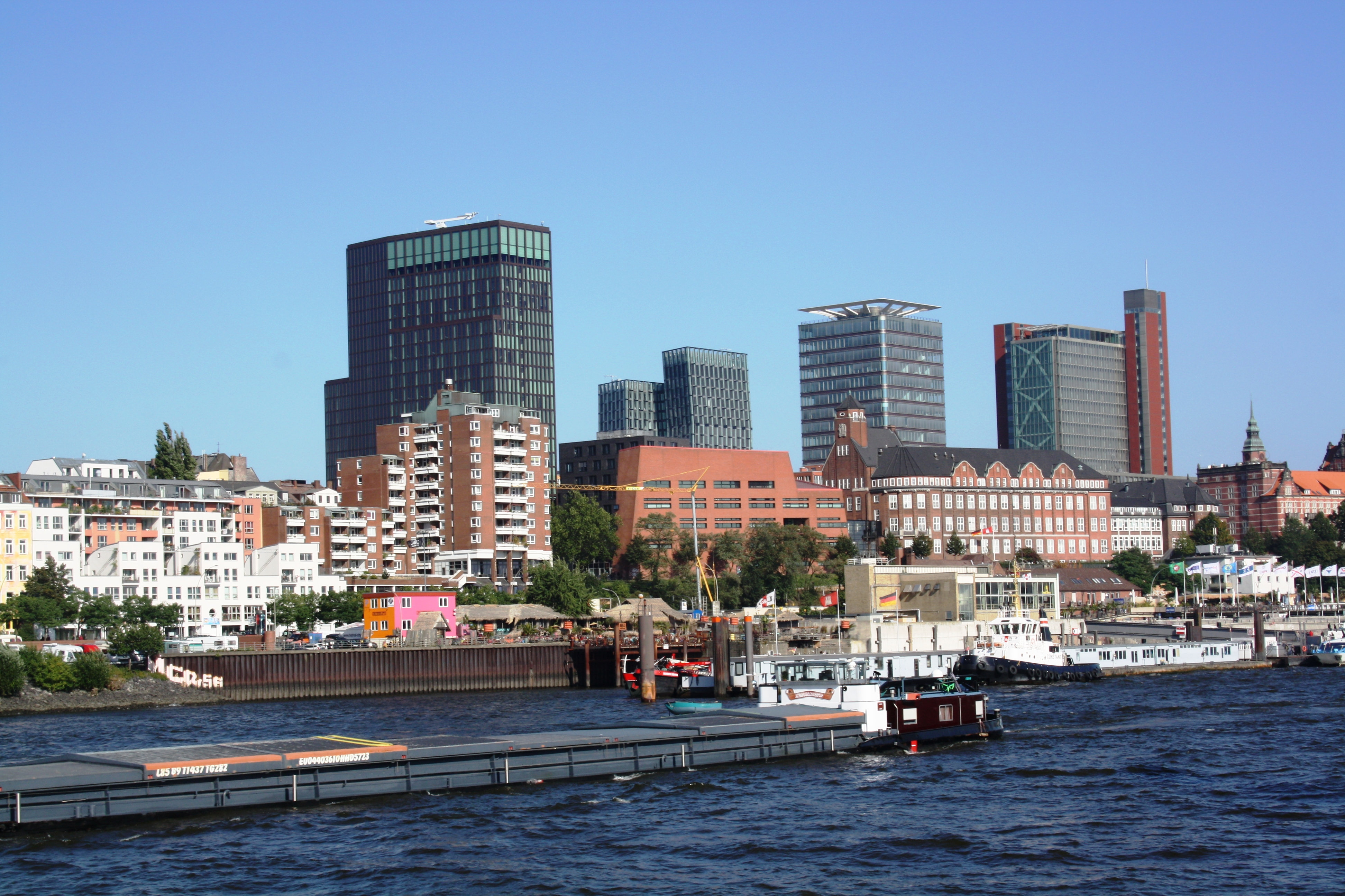 Die Neue Skyline von Hamburg, alias Hafenkrone - mit Empire Riverside Hotel, DWI-Turm und Atlantic-Haus, im Hintergrund die Tango-Türme an der Reeperbahn